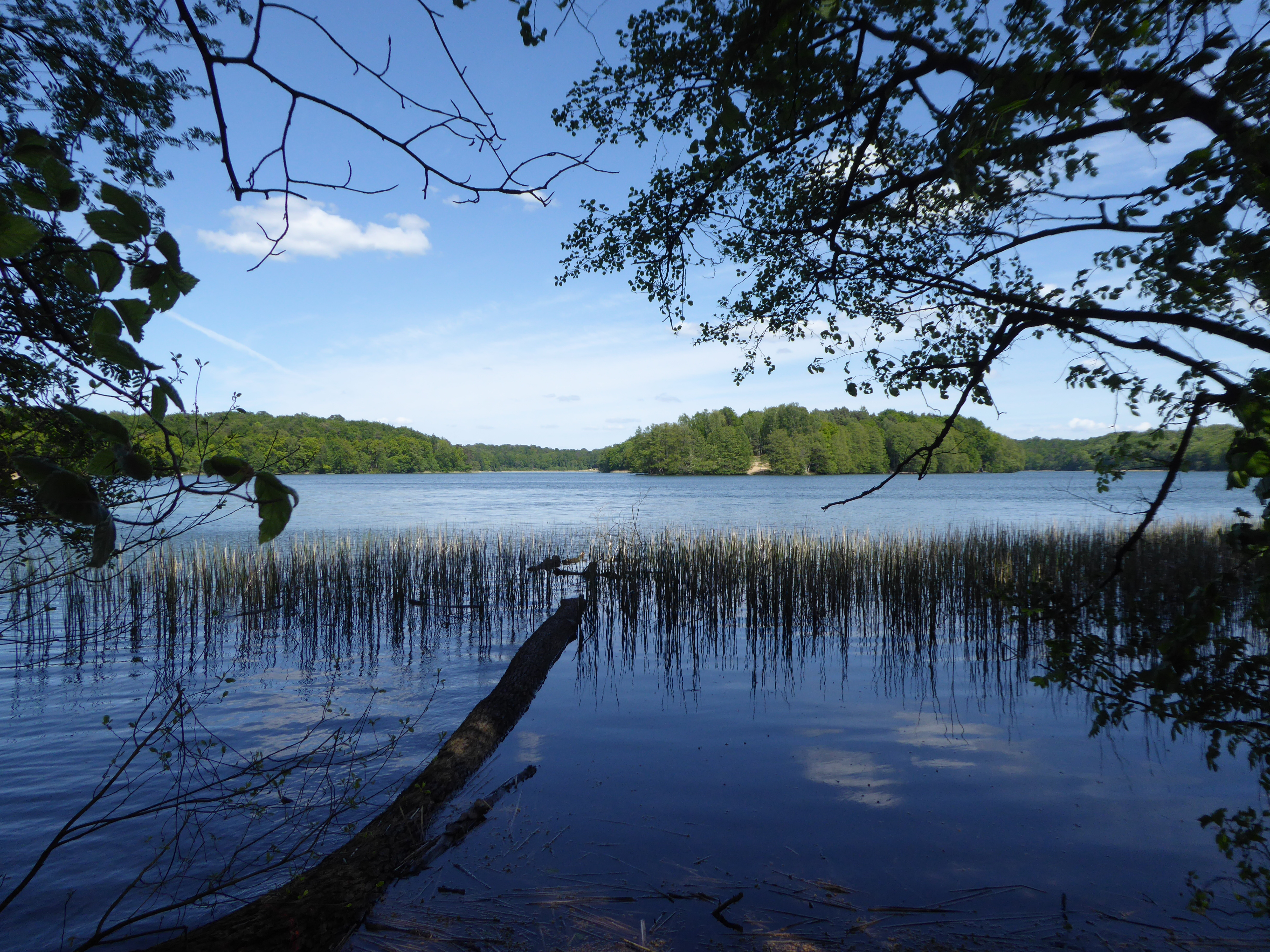 Großer Werder im Liepnitzsee bei Wandlitz (amtsfreie Gemeinde im Landkreis Barnim (Brandenburg)) - vom Westufer des Liepnitzsee gesehen. Short URL